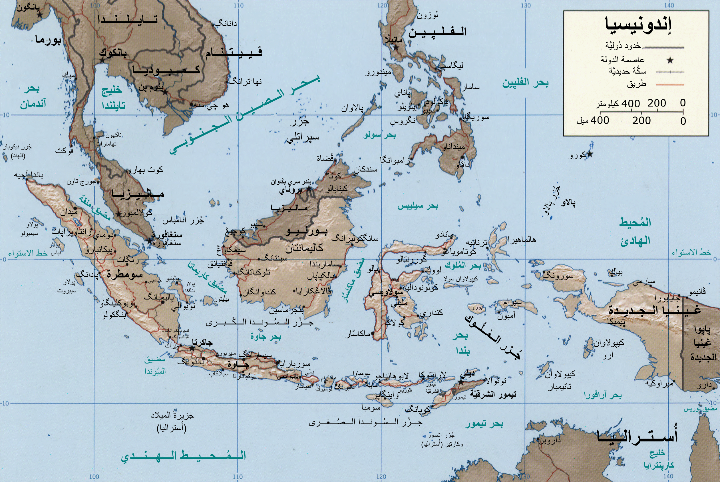 خارطة إندونسيا وبعض أنحاء الدُول المُجاورة، مُعرَّبة عن خريطة من إنتاج وكالة الاستخبارات المركزيَّة الأمريكيَّة.